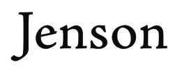 Typeface Jenson Antiqua